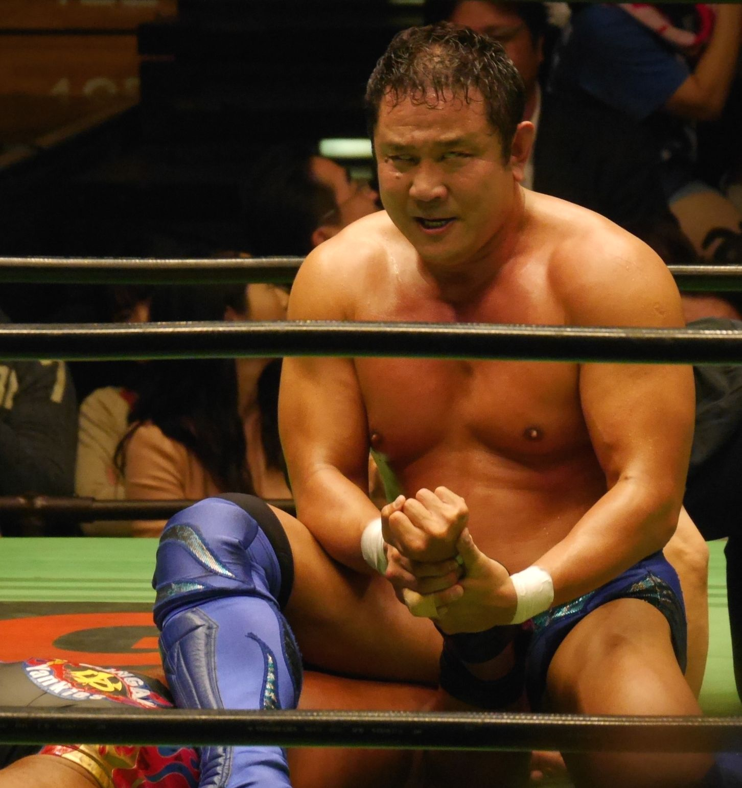 2014/11/04 ノア 対田中将斗